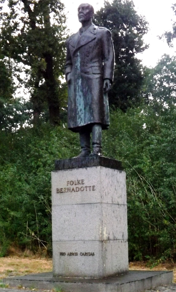 Denkmal von Volke Bernadotte in Dänemark